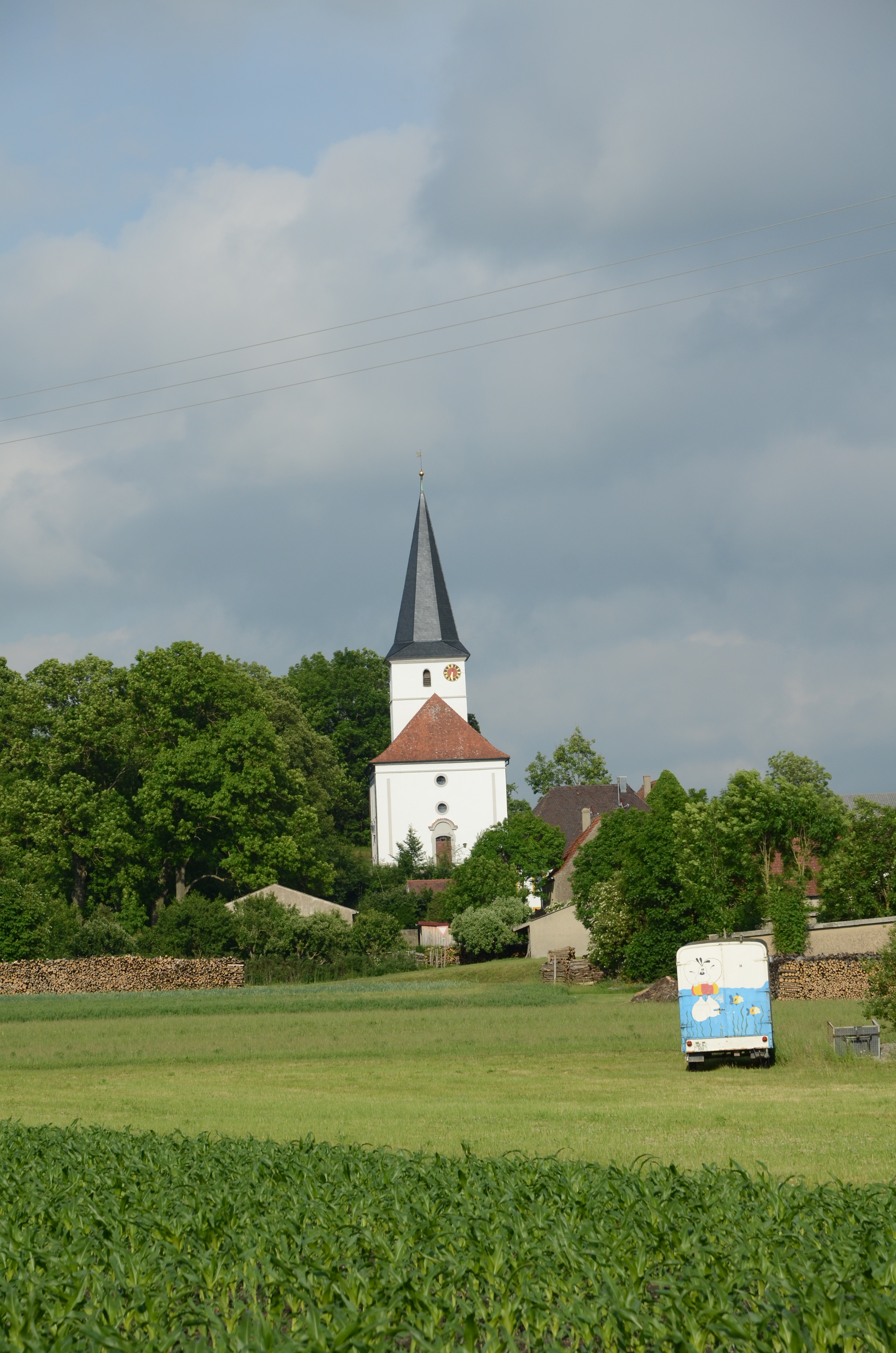 evang.-luth. Kirche in Ezelheim